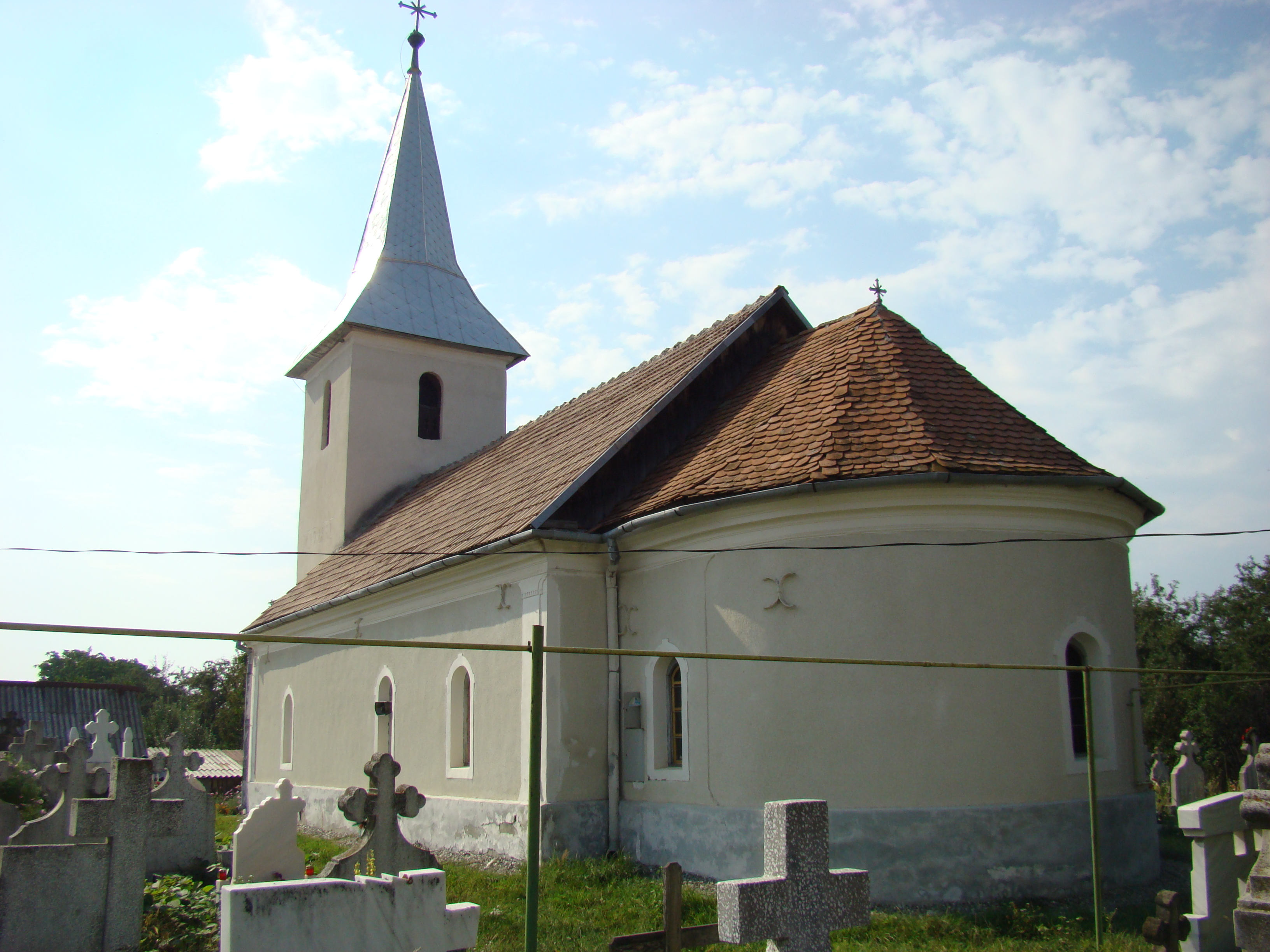 Biserica "Buna Vestire"-Streza, sat Cârțișoara; comuna Cârțișoara, județul Sibiu